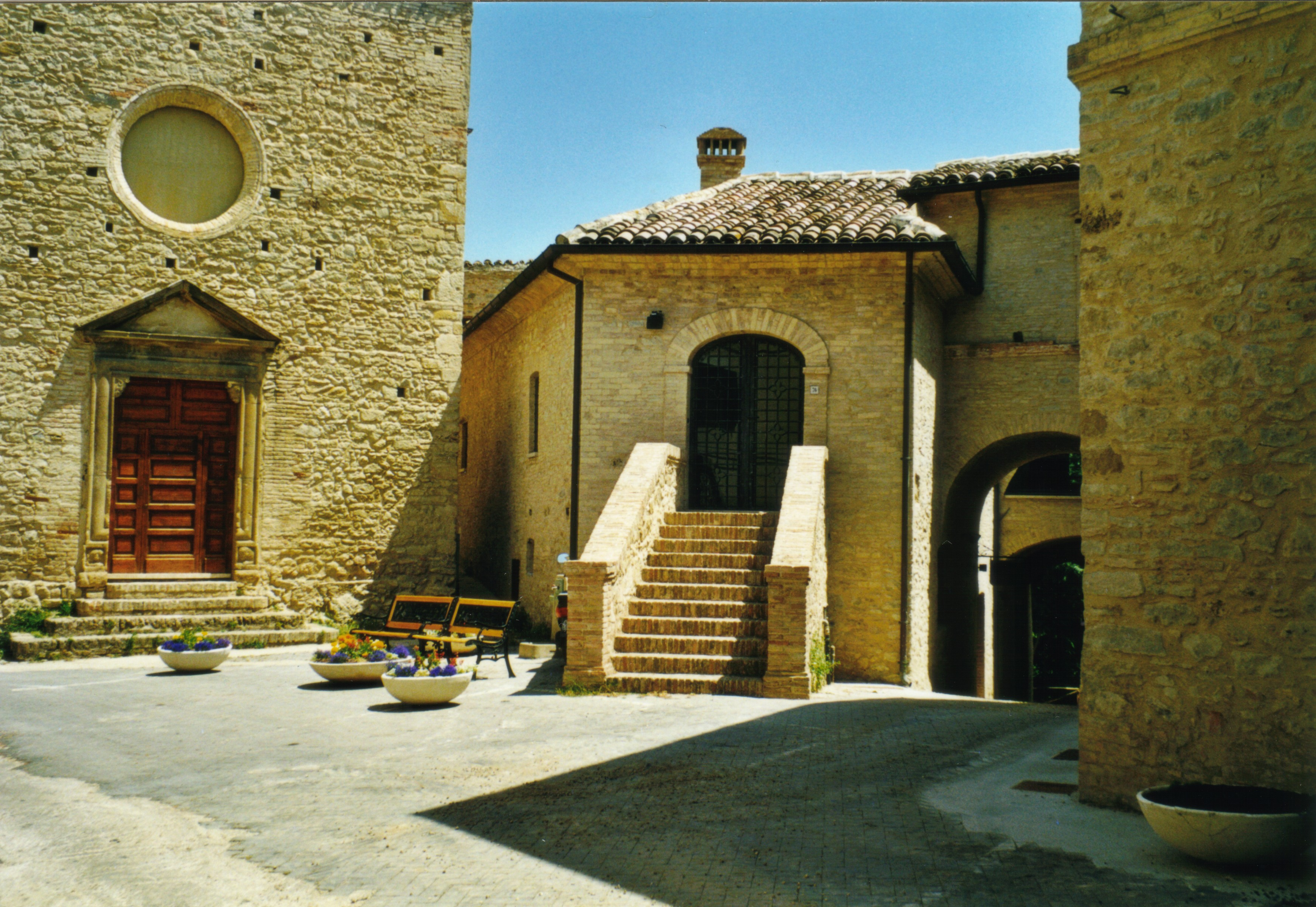 Ehemaliges Zentrum - Centro storico / Santa Maria da piede und Palazzo Monaco, Crecchio Sonstiges: GNU FDL